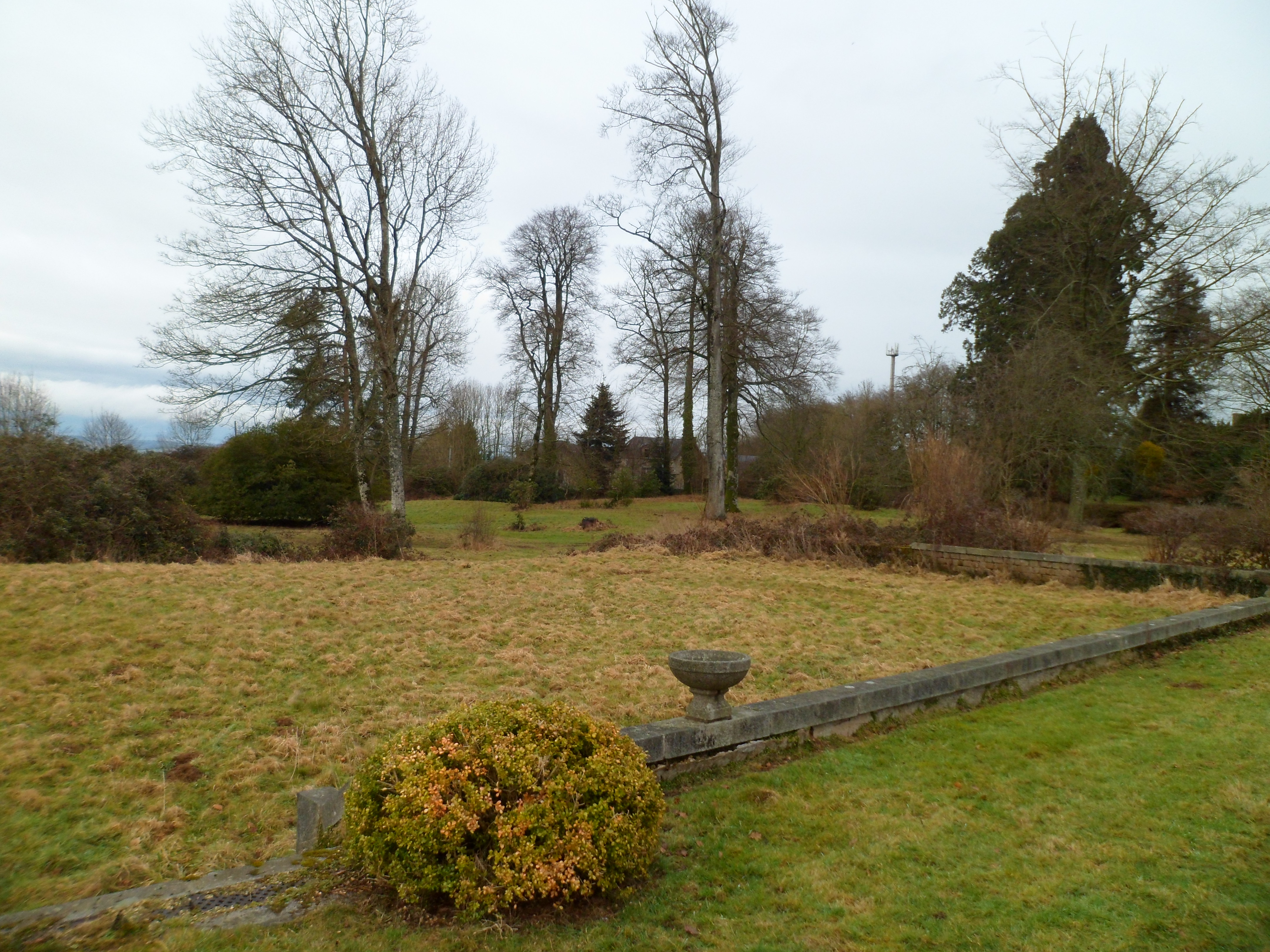 Domaine de l'ancien château de Saint-Symphorien